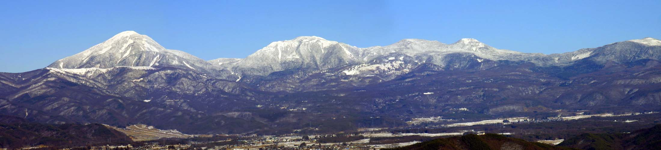 旧諏訪郡北山村域の俯瞰写真